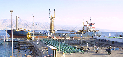 אניית התחמושת קארין איי ומטענה ברציף נמל אילת 6 בינואר 2002.